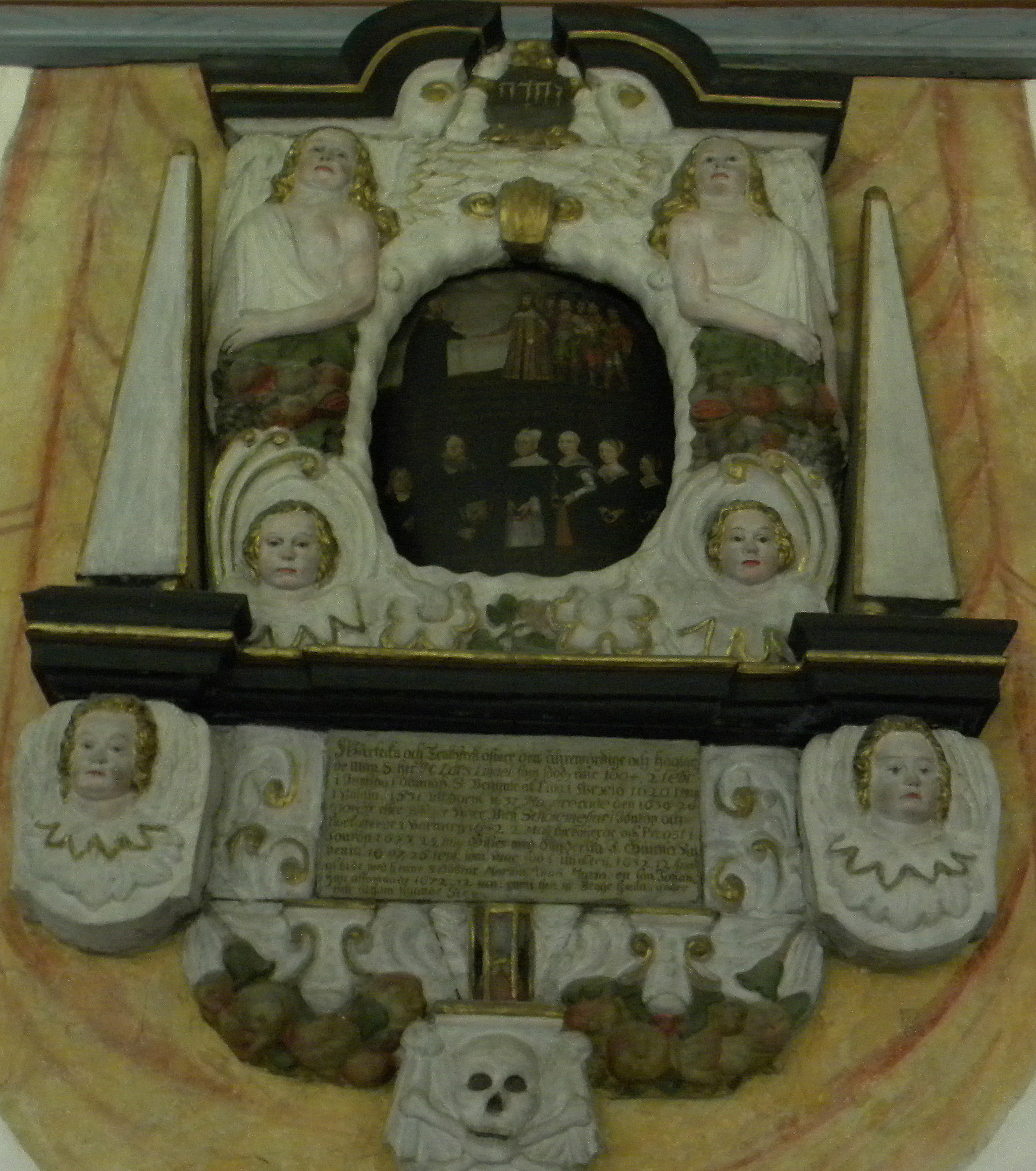 Ljungarums kyrka: Epitafium från omkring 1675 med tetragrammet JHWH högst upp